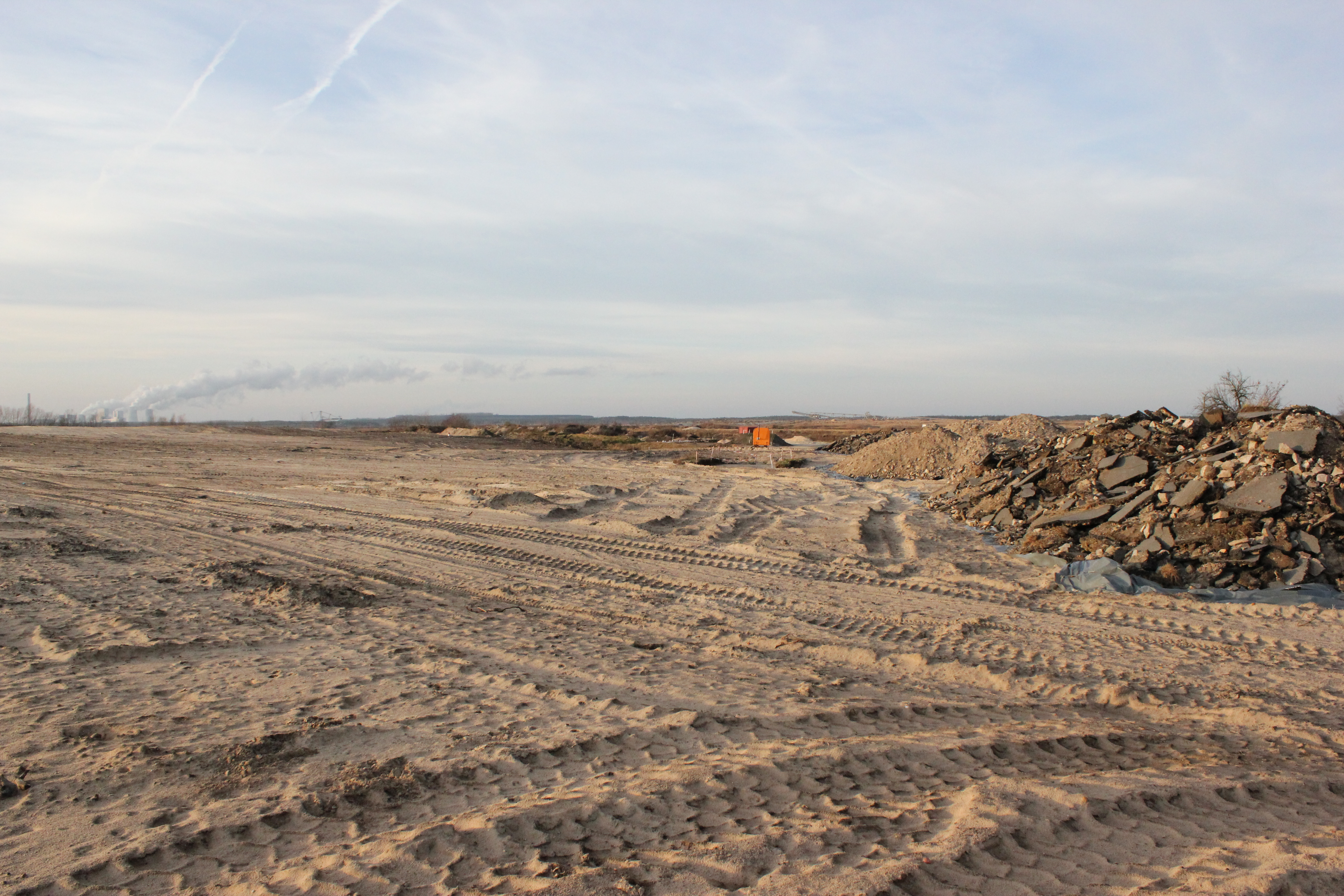 Hornjoserbsce: Powostanki Stareho Lubolnja w předpolu Rychwałdskeje brunicoweje jamy.